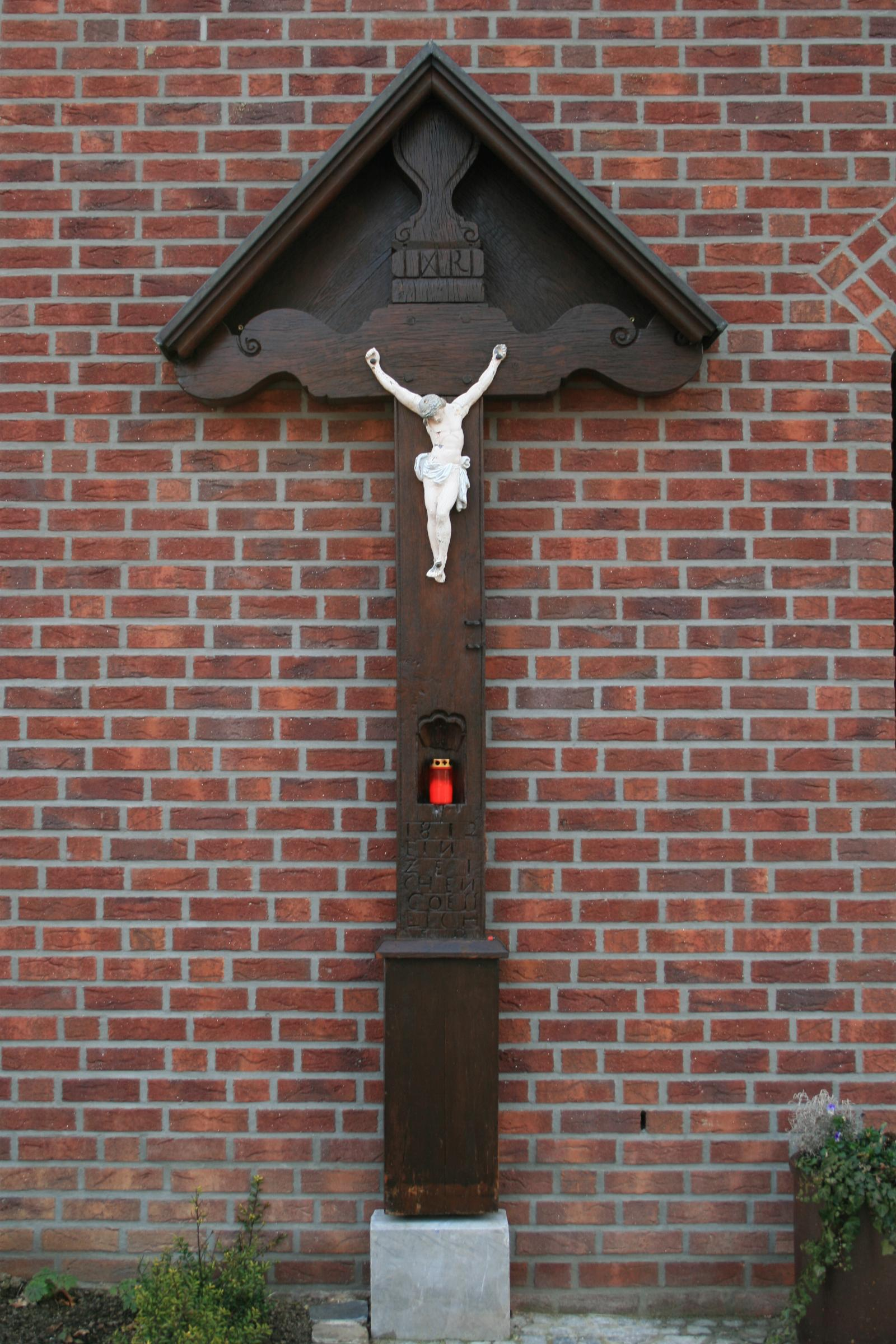 Gedenkkreuz in Grotenrath, Hauskreuz, Waldstraße 1, Denkmal Nr. 22 in Geilenkirchen